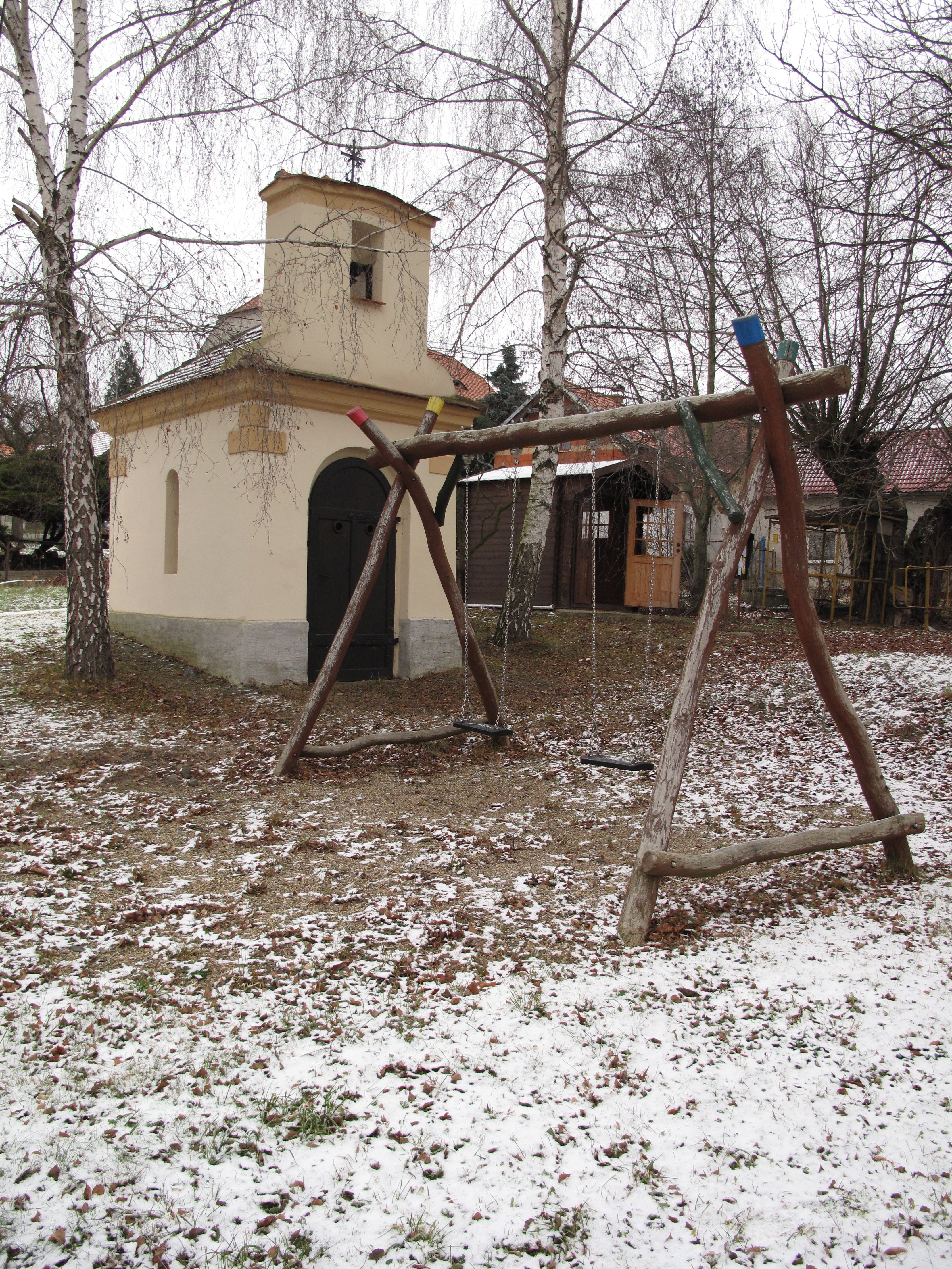 Kaplička a houpačka v Šepetelech. Okres Litoměřice, Česká republika.